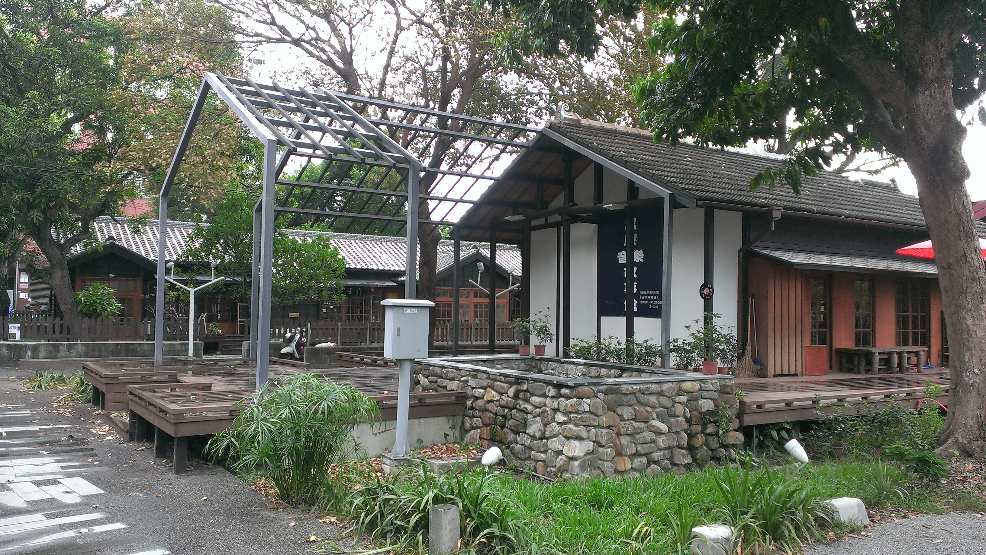 雲林縣歷史建築──警察局舊宿舍群